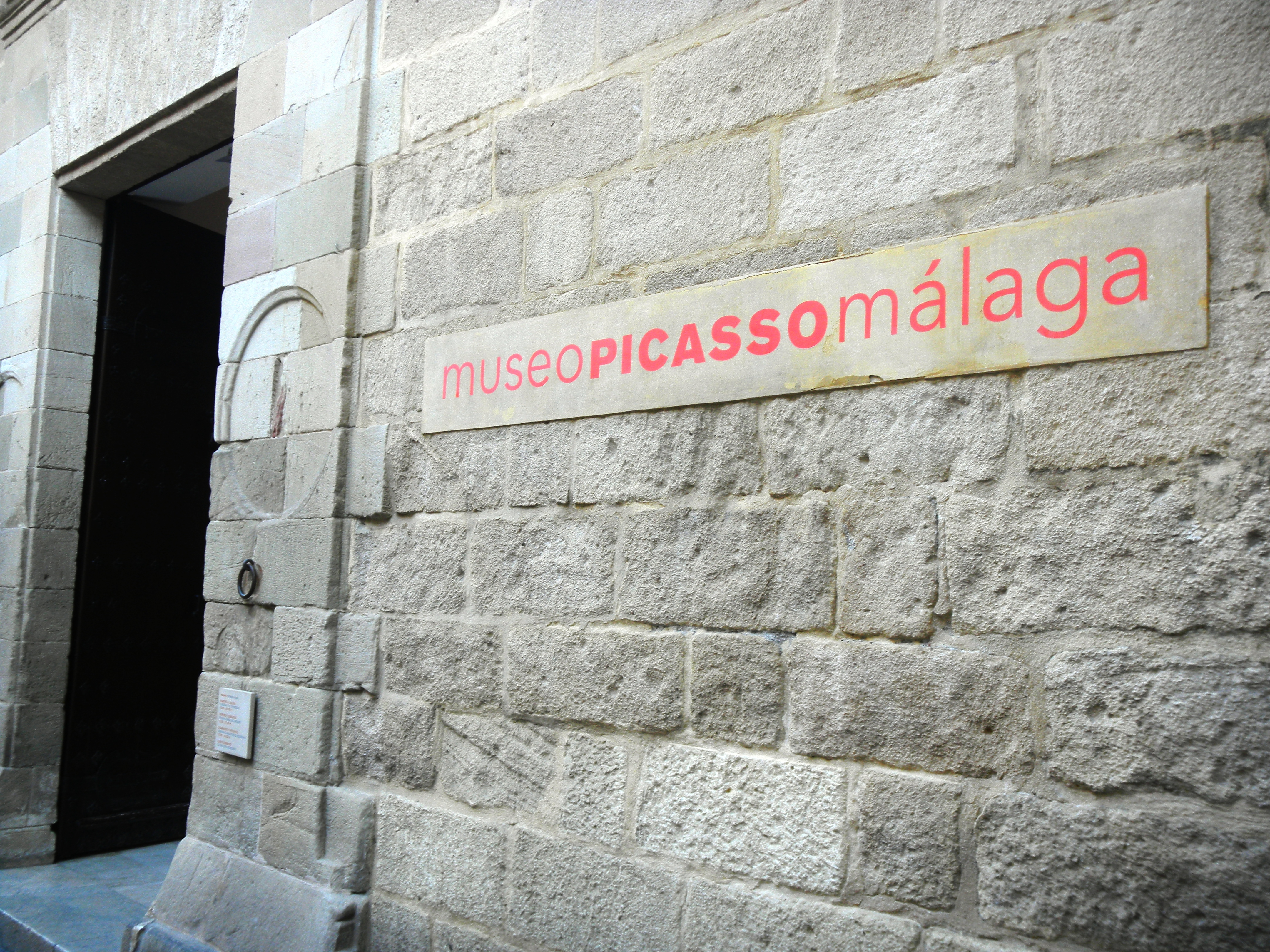 Entrada del Museo Picasso Malaga